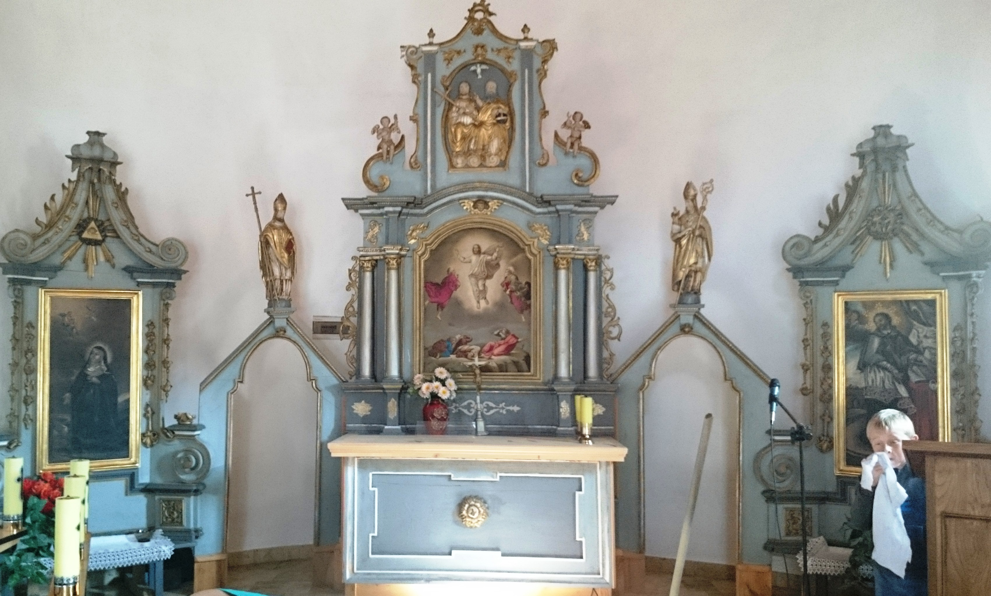 Ołtarz w kaplicy pw Przemienienia Pańskiego przy ul. św. Kingi w Krościenku nad Dunajcem